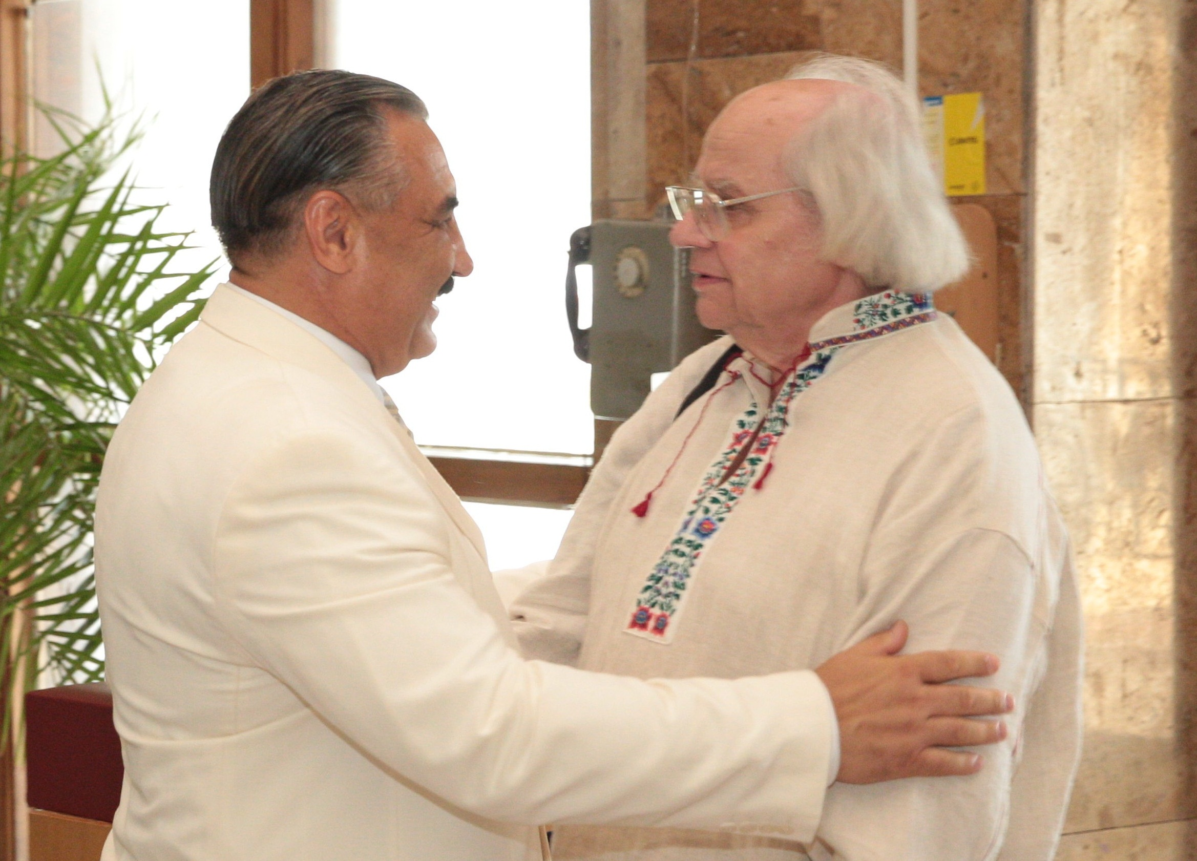 Фото з презентації книги.